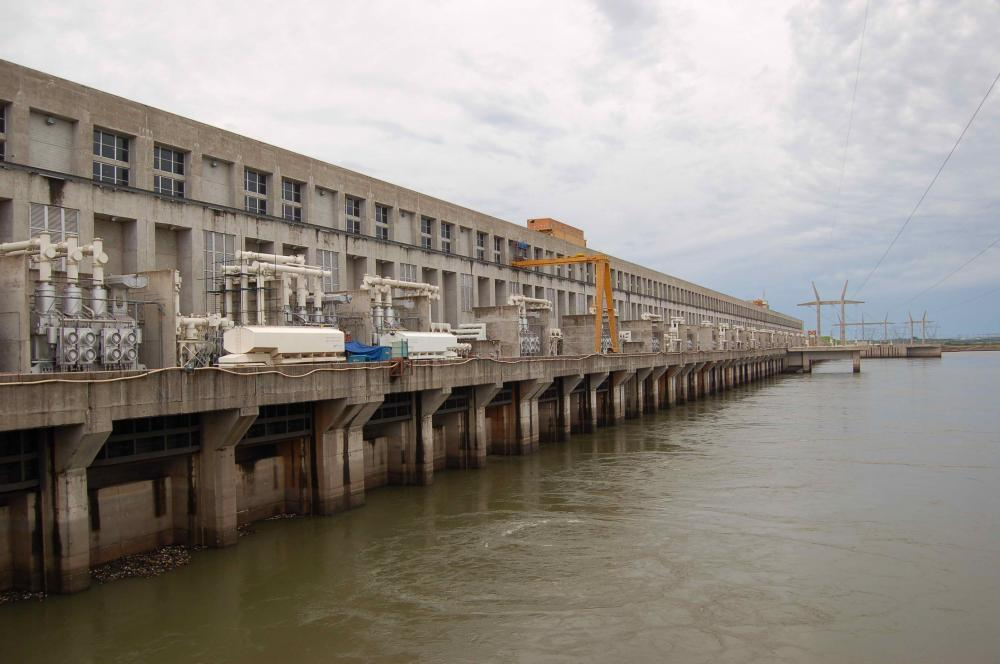 Трансфсорматоры на ГЭС Ясирета, Аргентина